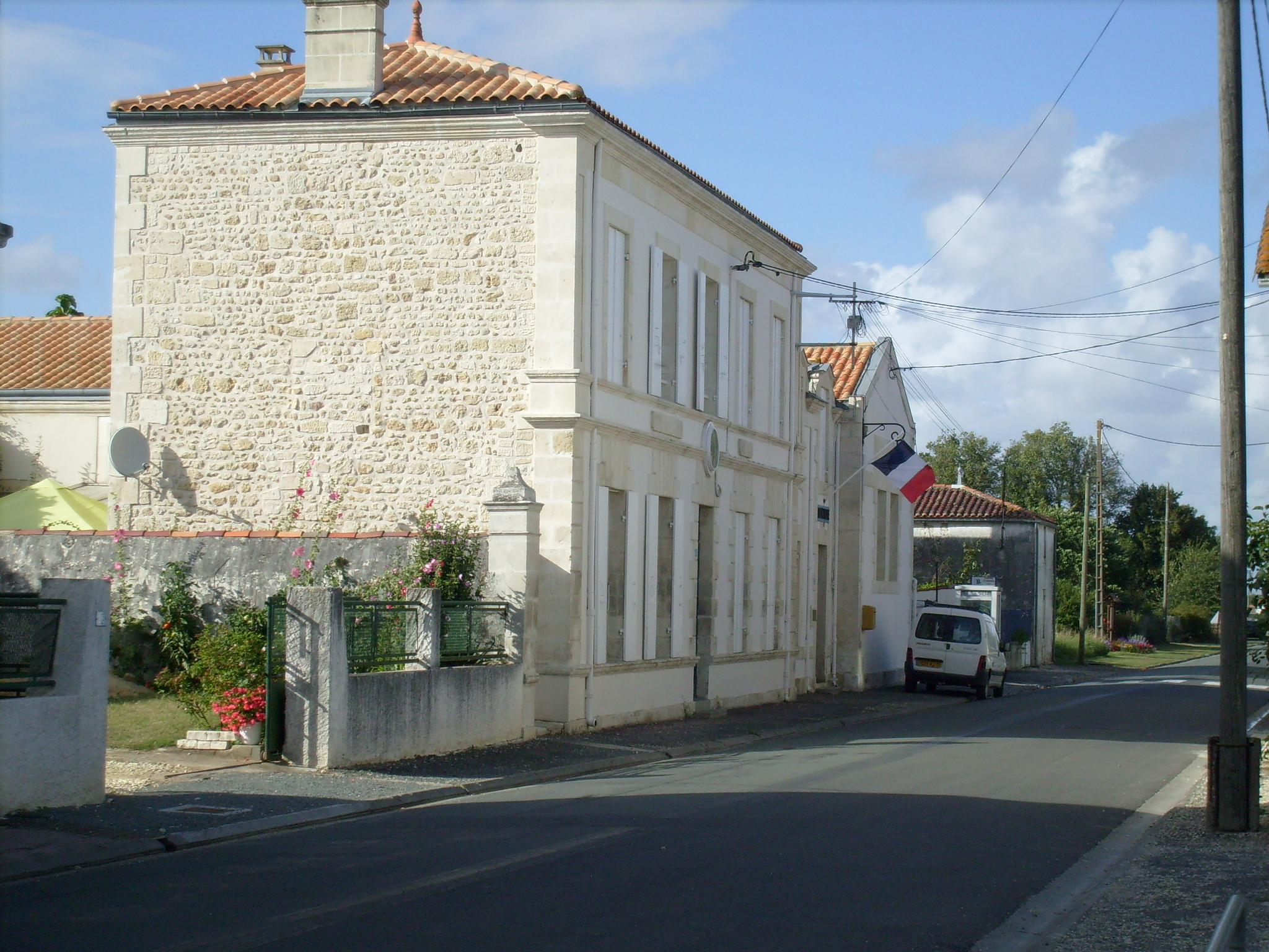 Mairie de La Gripperie-Saint-Symphorien